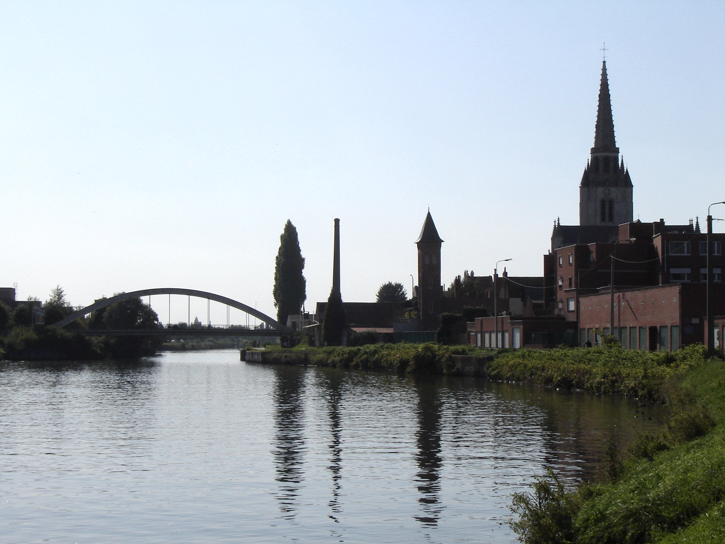 Sint-Medardus church and Leiebrug in Wervik, on the Leie river. Wervik, West-Flanders, Belgium